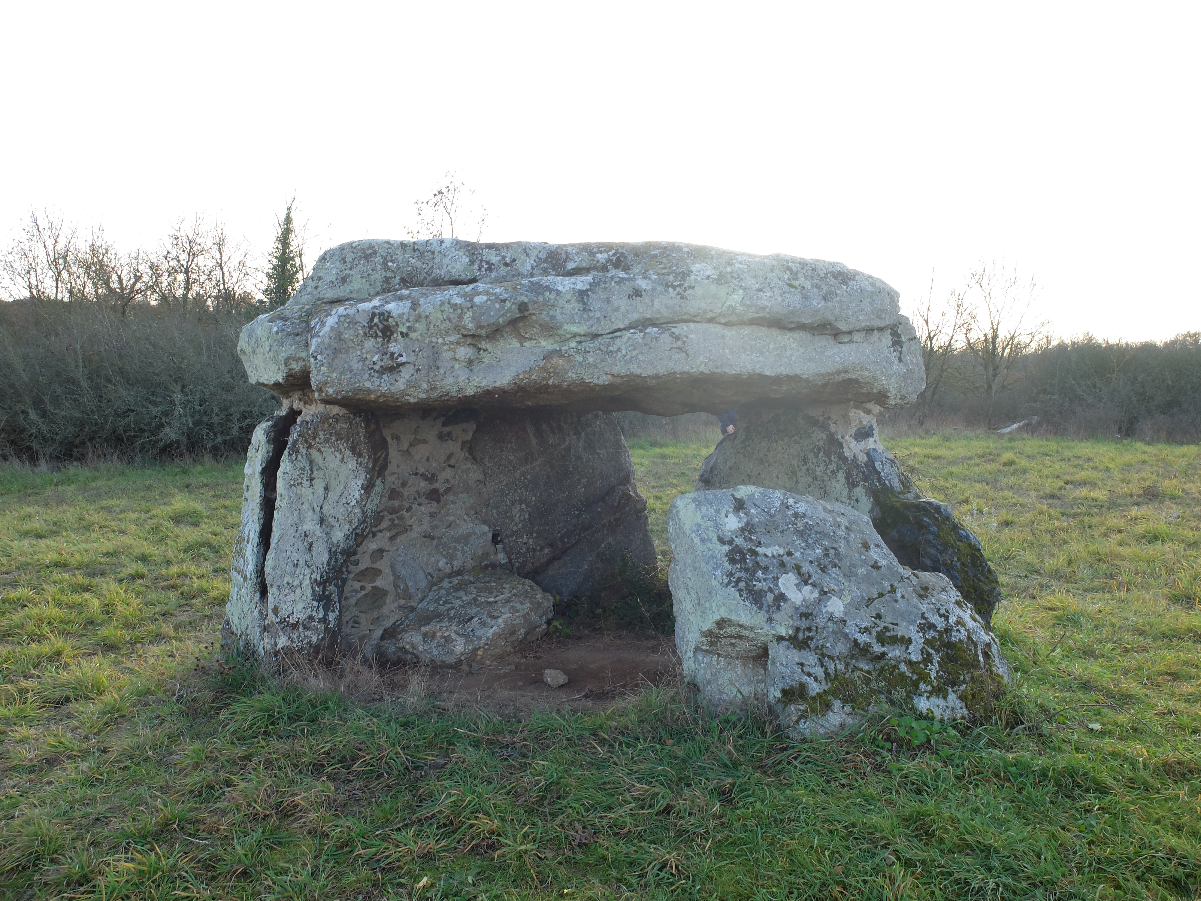 Dolmen de la Pierre couverte de Montbenault